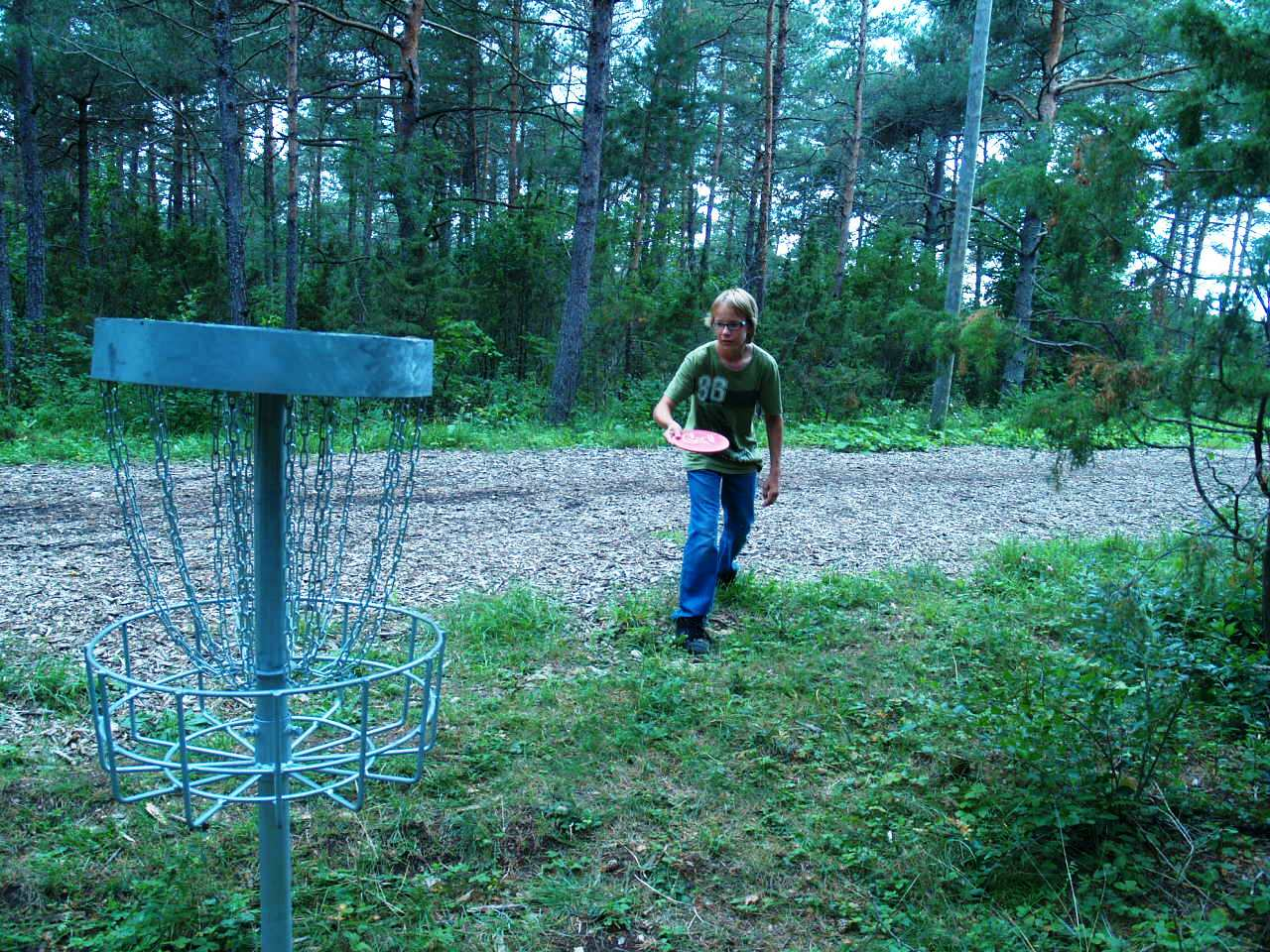 Kettagolf Keilas.